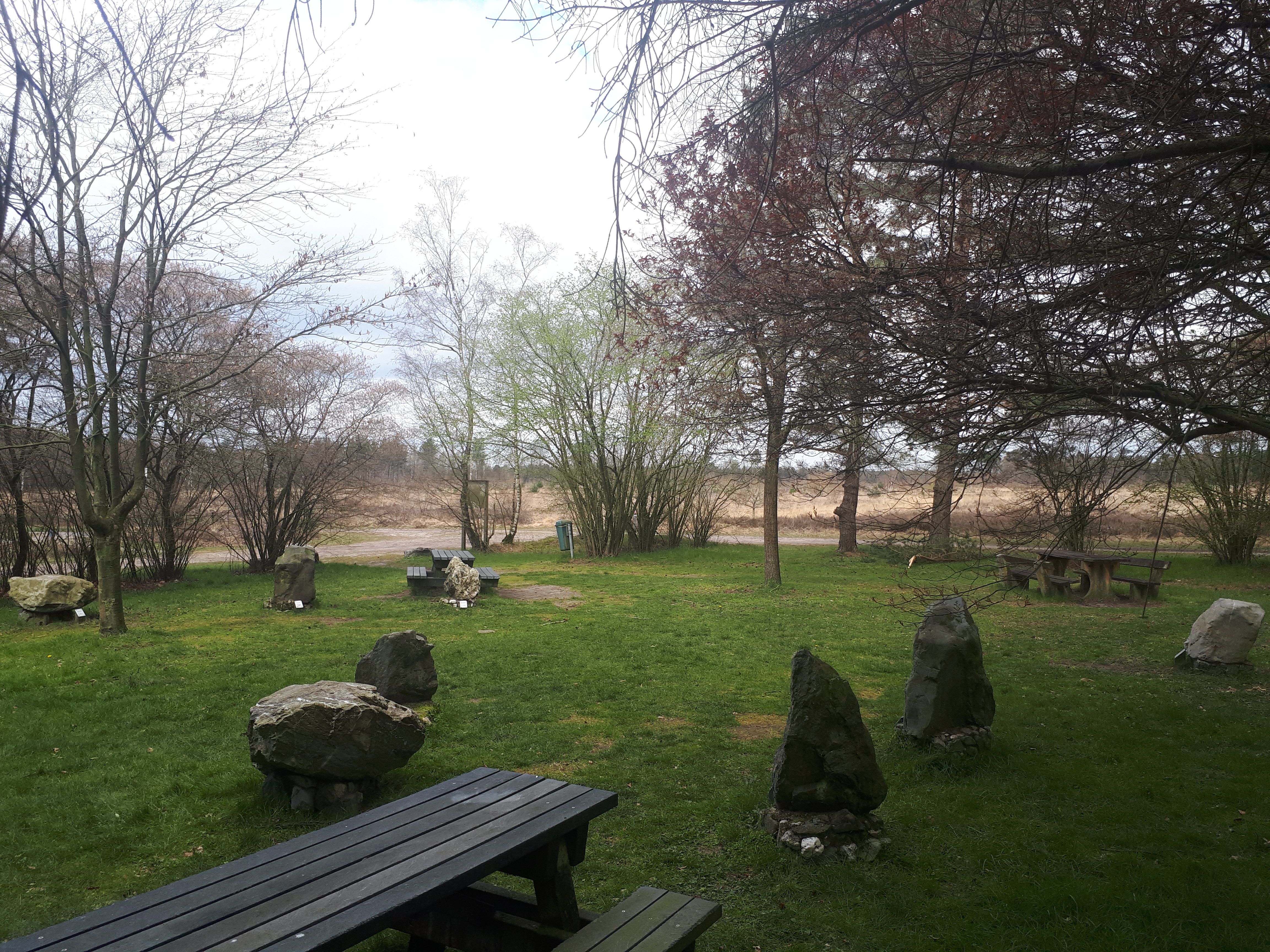 Het monument de Stenen der Zaligheden aan de Peelse Heide in Reusel, die bestaat uit een formatie van natuurstenen die de Acht Zaligheden symboliseren.